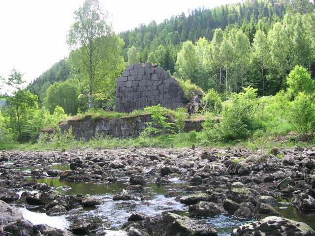 Restene etter masovnen på Moholt